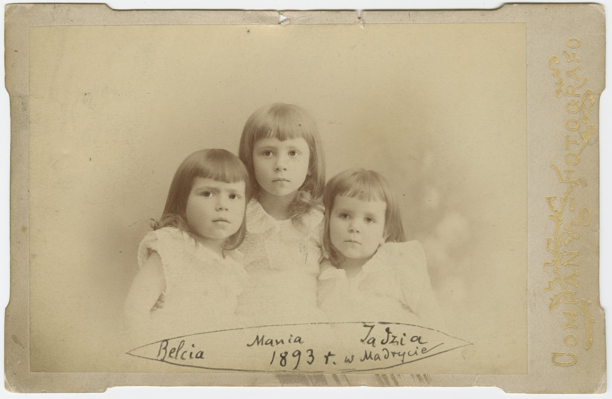 Retrato de tres das fillas de Sofía Casanova e Wincenty Lutosławskich